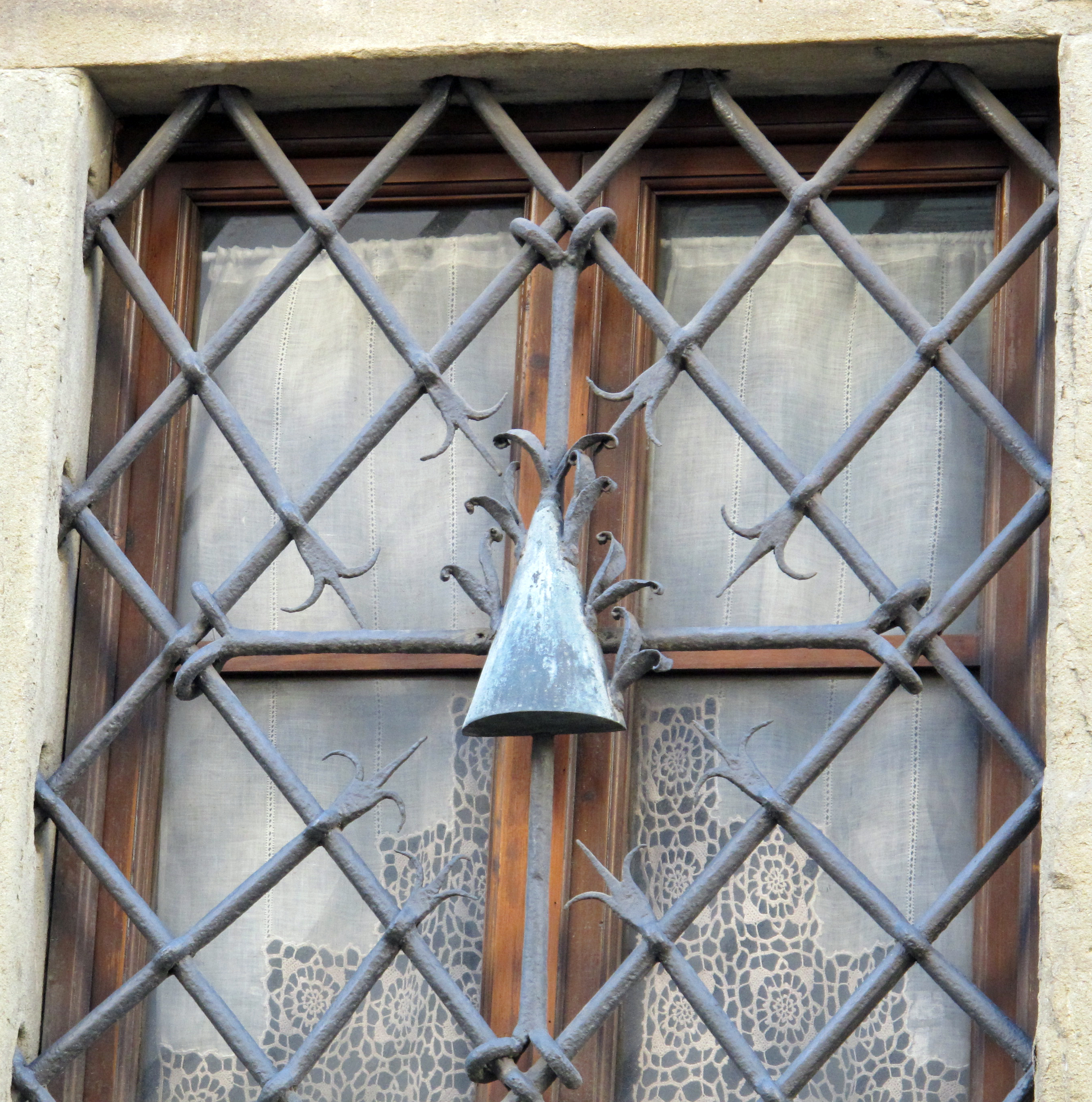 Via Giusti (Firenze)